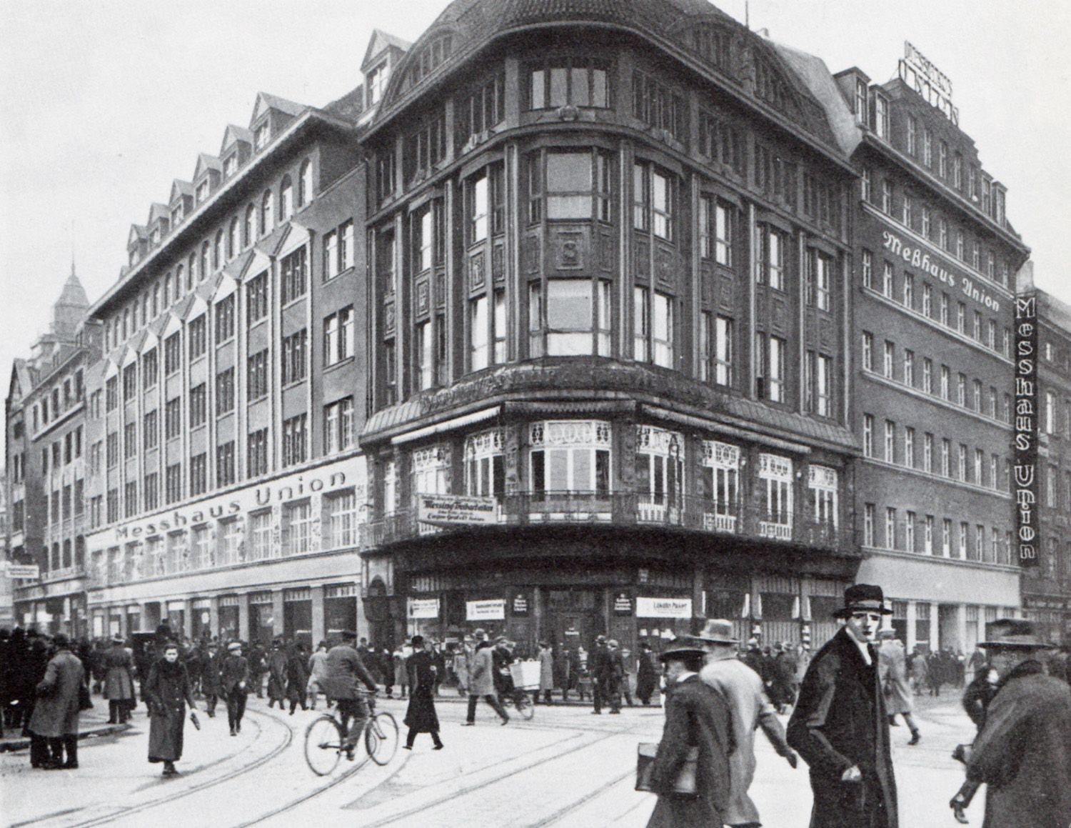 Das Messehaus Union in Leipzig Am Hallischern Tor Ecke Richard-Wagner-Straße im Jahr seiner Erbauung